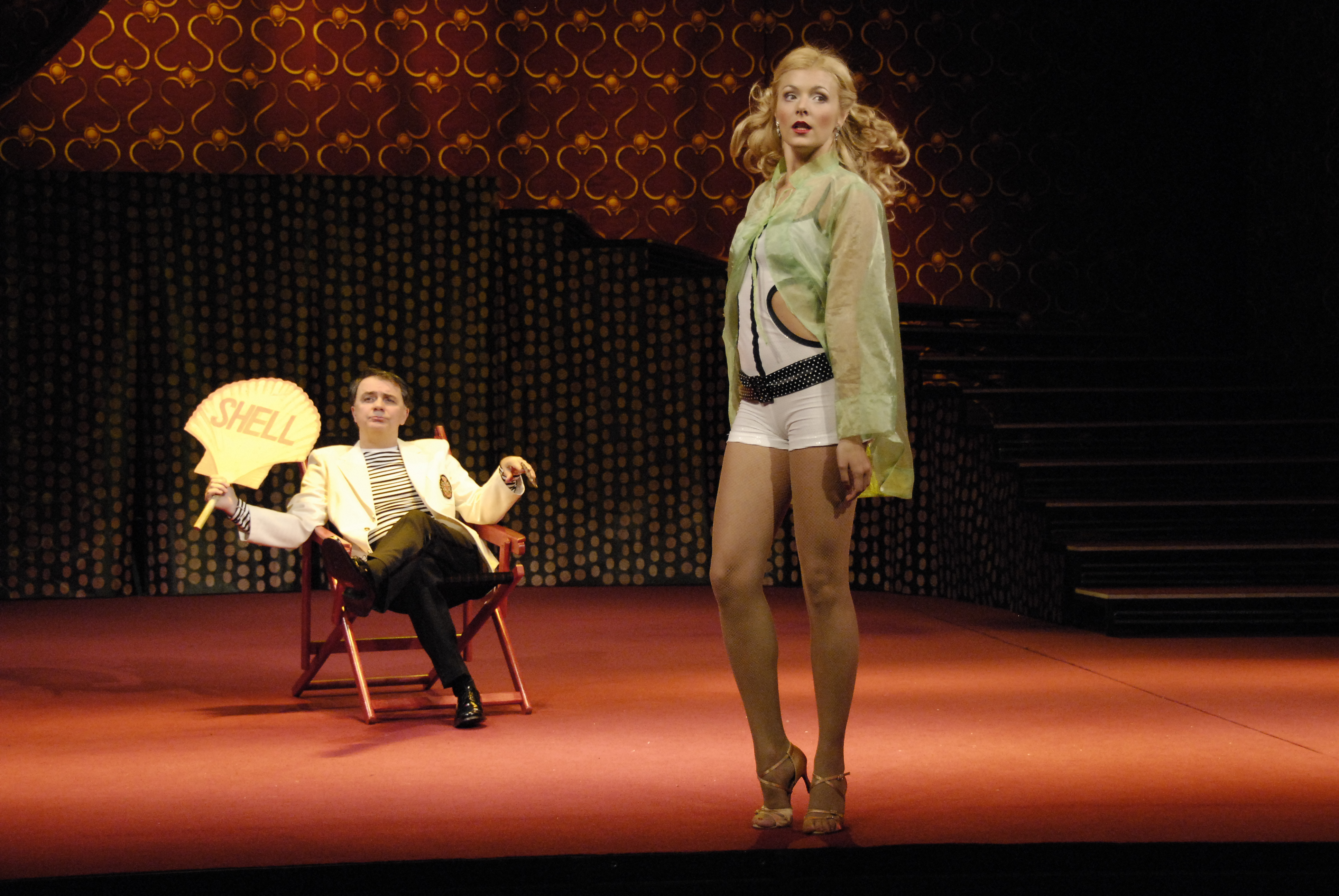 Premijera predstave "Neki to vole vruće"